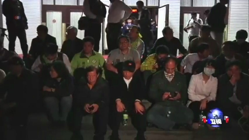 中文（台灣）: 立法院前的民主進步黨成員。